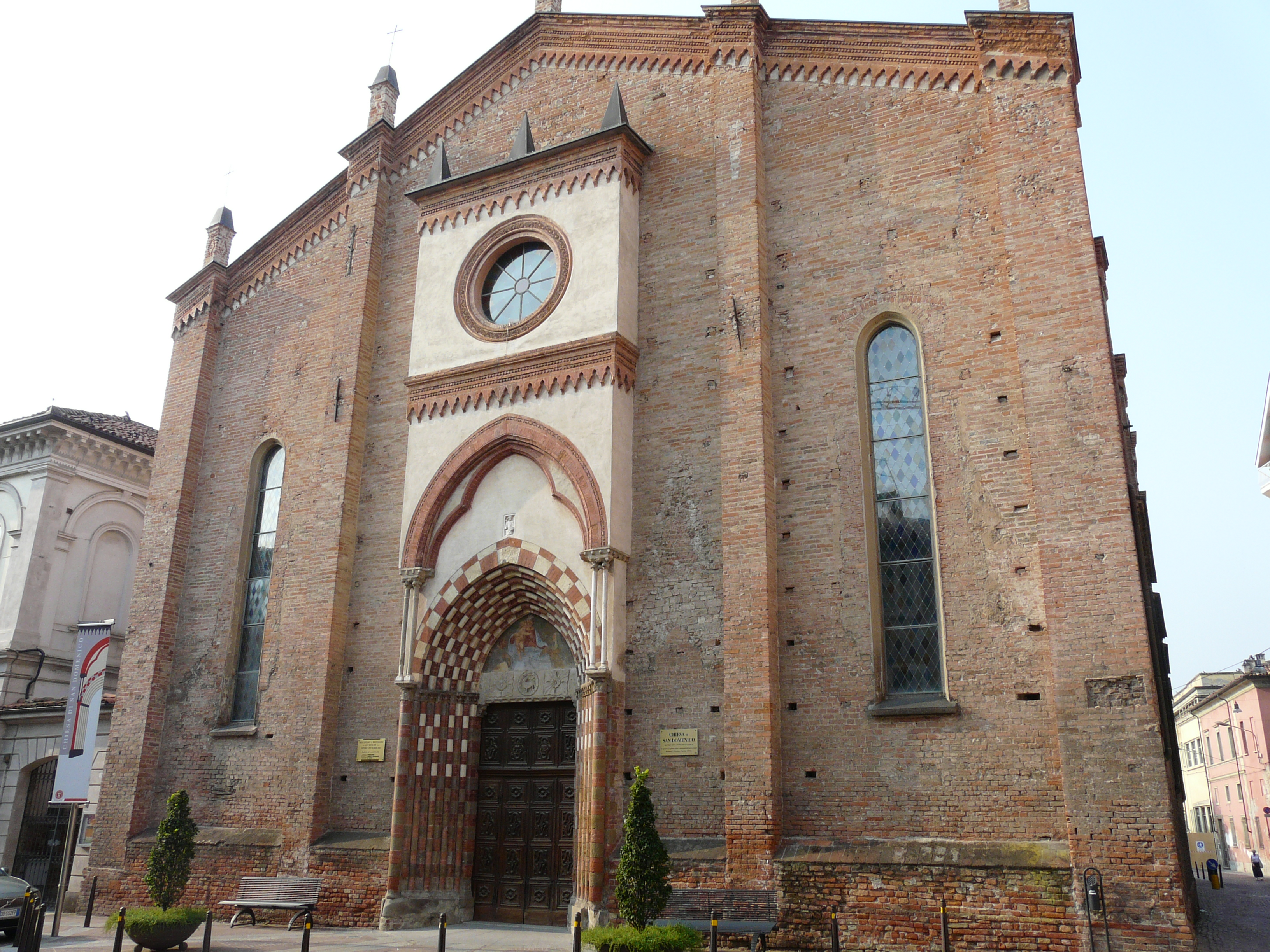 Chiesa di San Domenico, Alba, Piemonte, Italia